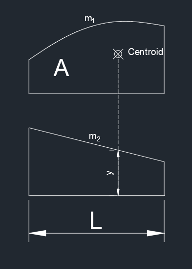 Product Integral